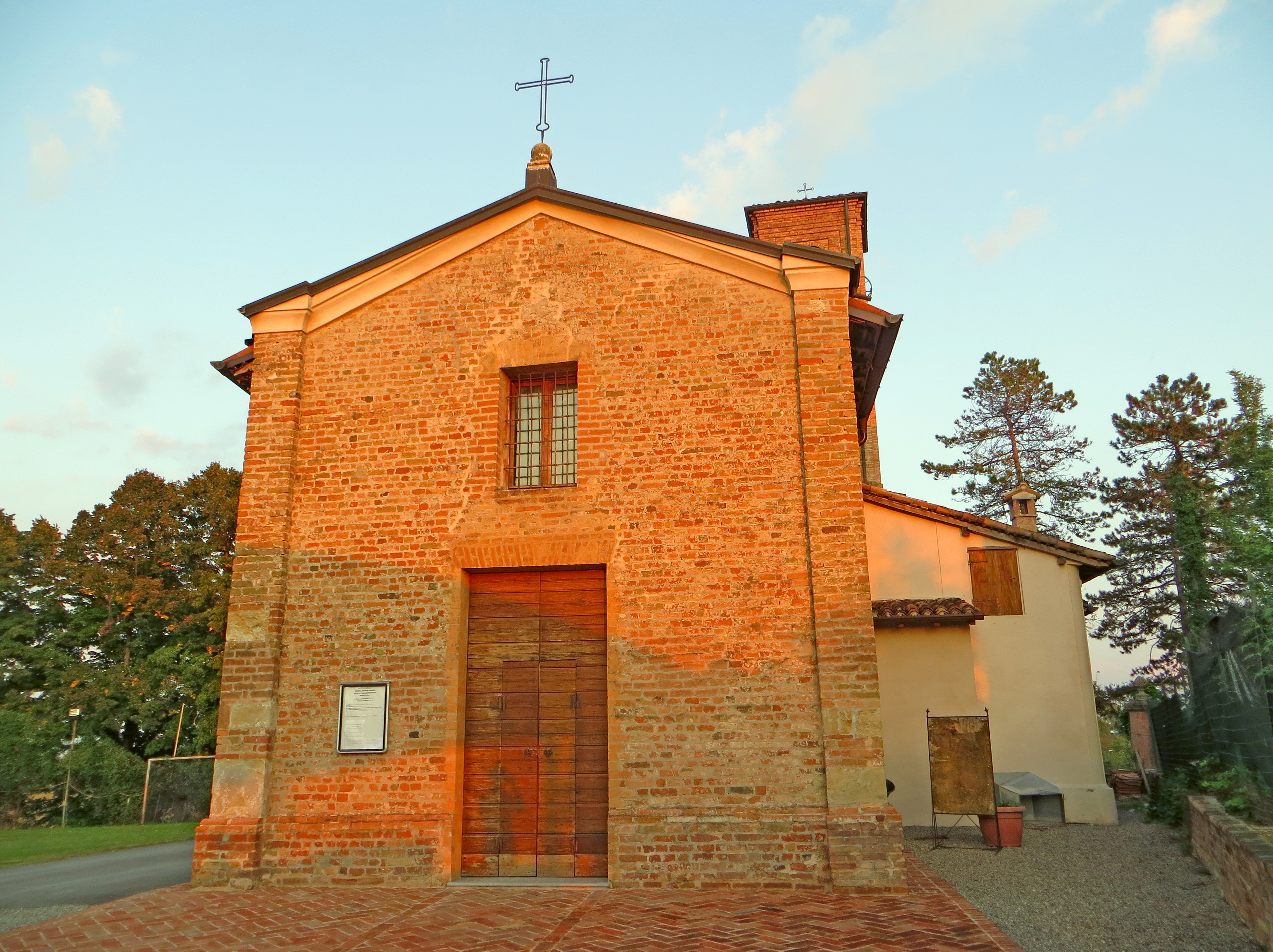 Chiesa di San Tommaso Becket (Cabriolo, Fidenza) - facciata